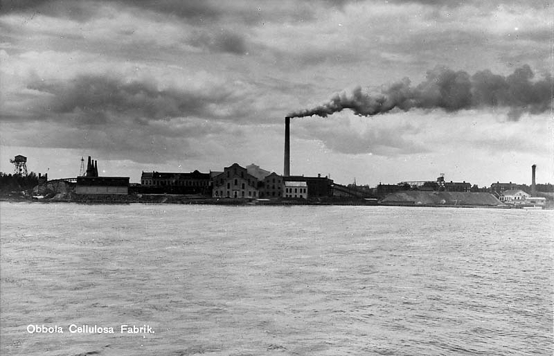 Obbola cellulosafabrik.; Byggnadsverk; Industrianläggning; Massa- och papperstillv